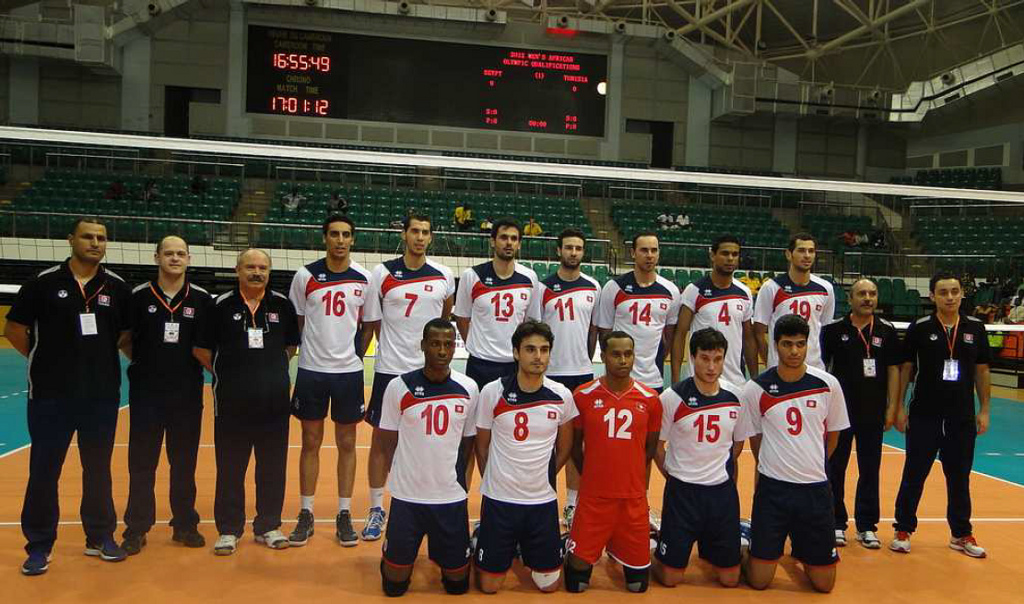 Équipe de Tunisie de volley-ball jouant un match contre l'Égypte dans le cadre des qualifications pour les Jeux olympiques d'été de 2012 : 16 - Hichem Kaabi 7 - Ilyès Karamosli 13 - Nourredine Hfaiedh (C) 11 - Ismail Moalla 14 - Bilel Ben Hassine 4 - Marouen Garci 19 - Nabil Miladi 10 - Hamza Nagga 8 - Mohamed Ben Slimane 12 - Anouer Taouerghi (L) 15 - Mehdi Ben Cheikh 9 - Omar Agrebi